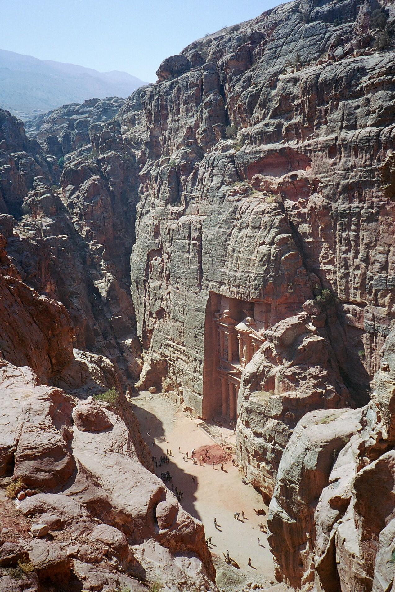 Khazneh in Petra seen from Jebel al Khubtha